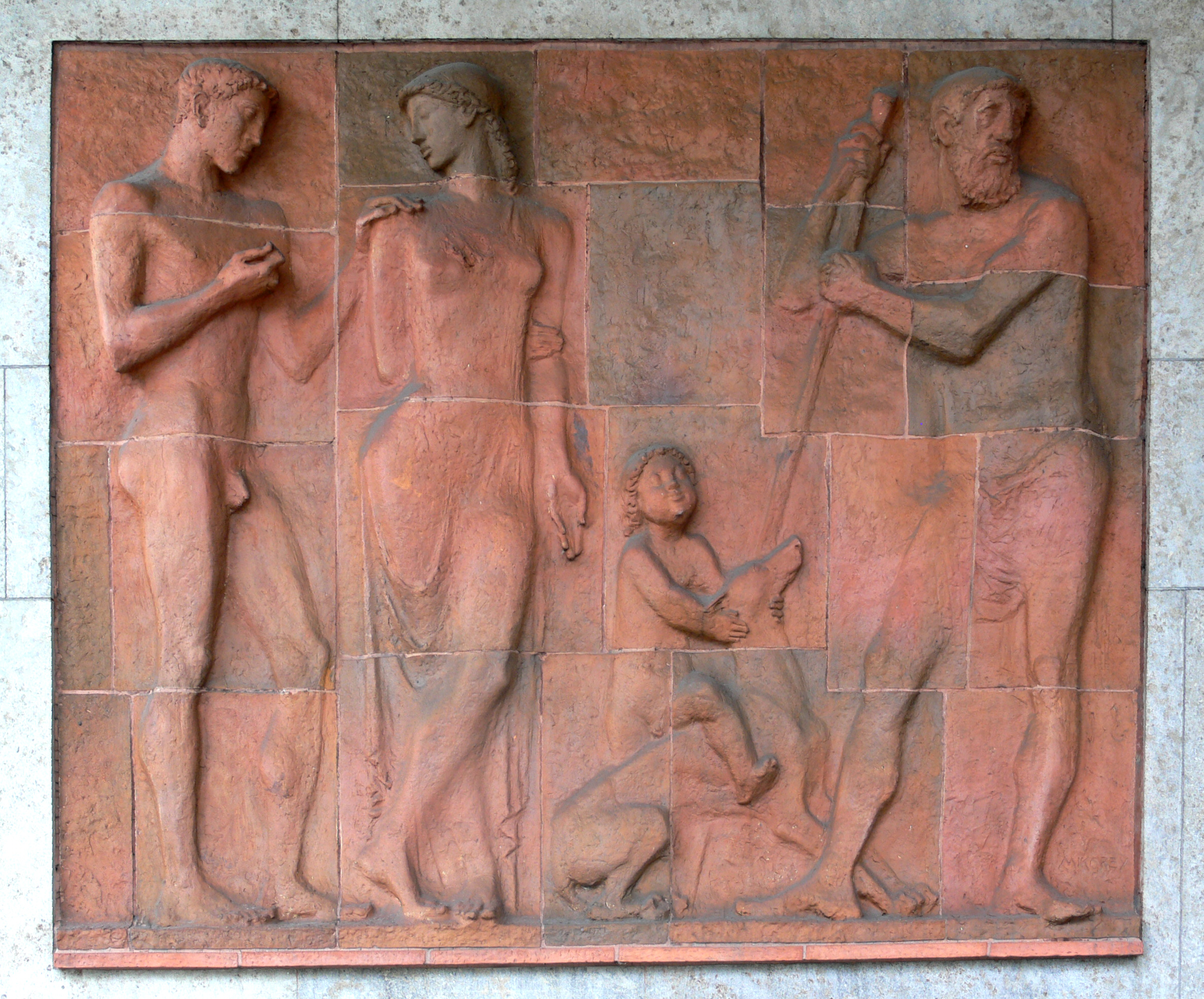 Franz Mikorey, Relief am Haus Maximiliansplatz 13, München (Bankhaus Reuschel & Co.)